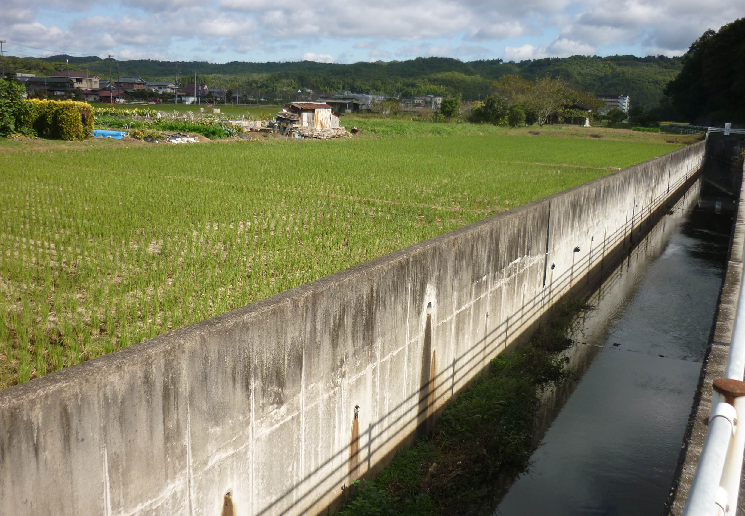 旧武庫川